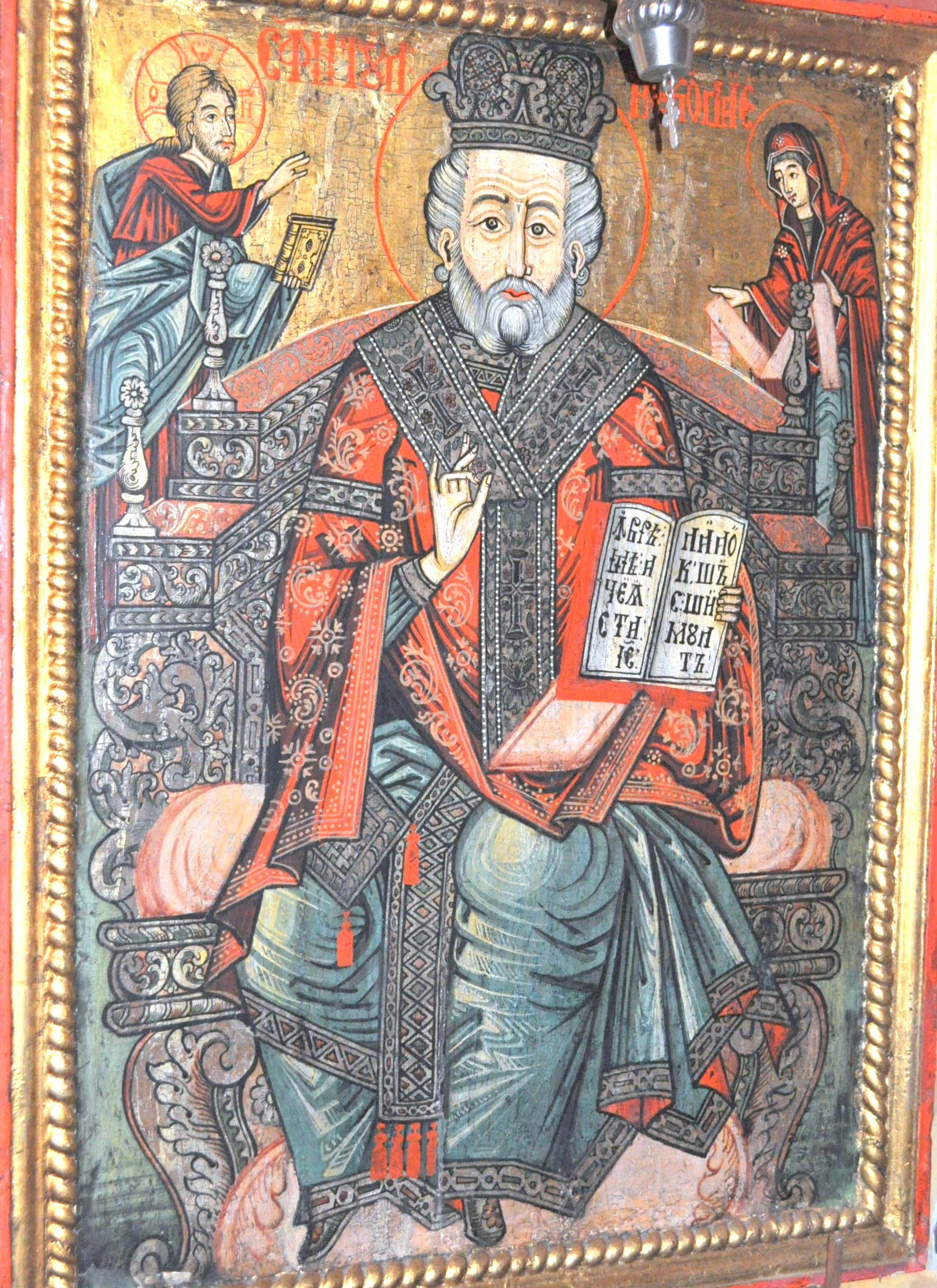 Biserica "Sf. Nicolae" din Mohu, județul Sibiu